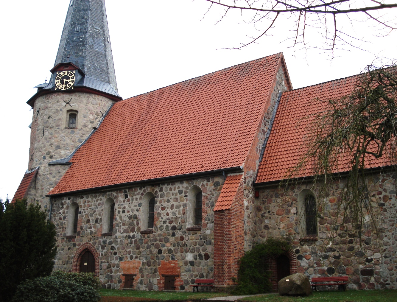 Die Vicelinkirche Pronstorf - von Süden